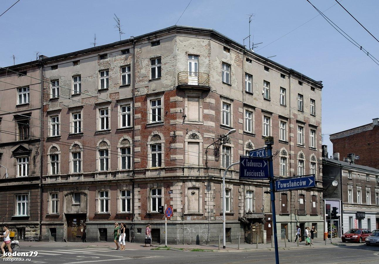 Kamienica na rogu ulic Kościuszki i Pck